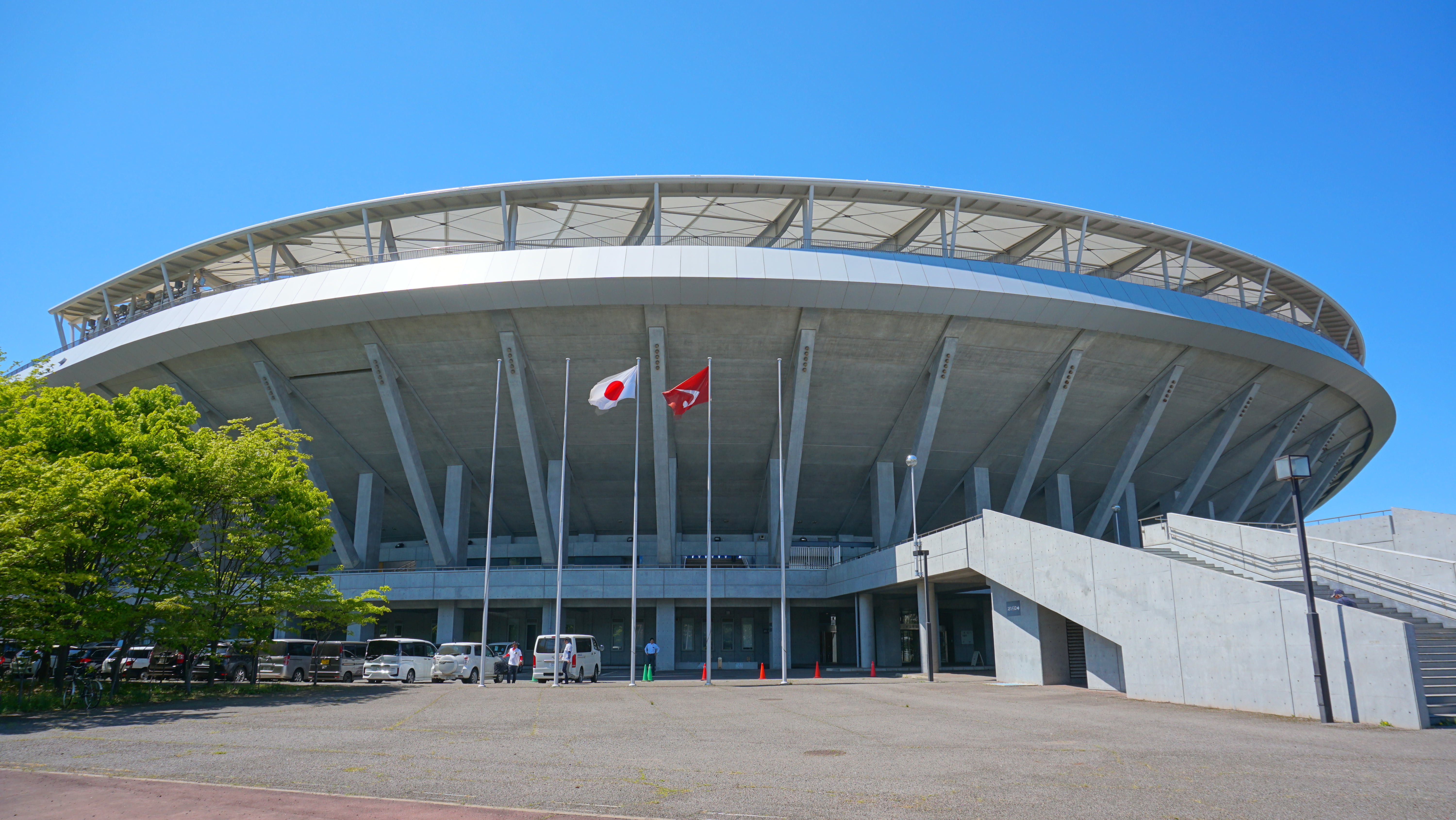 秋田県立野球場（秋田こまちスタジアム）